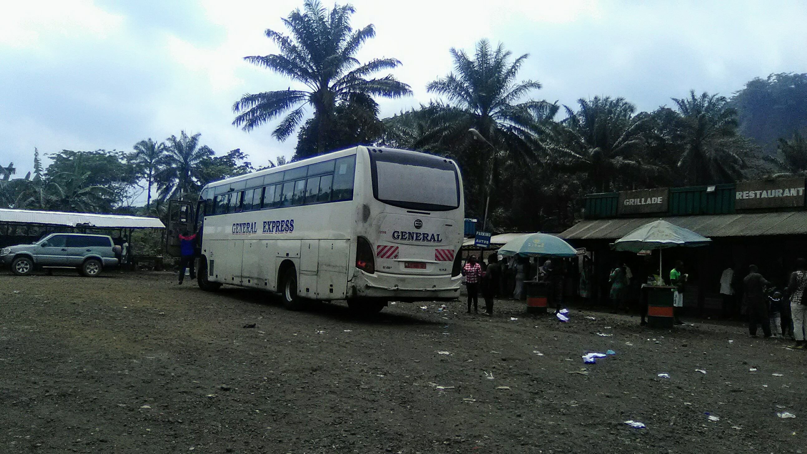 Kutenda Center est situé sur la route nationale numéro 5 reliant Douala aux régions de l'ouest et du nord-ouest. C'est un lieu de repos pour tout voyageur empruntant cet axe routier où il y a bien sûr à manger et à boire: viandes de porc, chèvre, mouton, bœuf, banane plantain, brunchs, jus de fruits naturel, fruits comme ananas, papaye, boissons gazeuses, bières, liqueurs et vins. On y trouve aussi des toilettes publiques. Bakakté fait partie de la périphérie de la ville de Manjo. This is an image with the theme "Africa on the Move or Transport" from: Cameroon